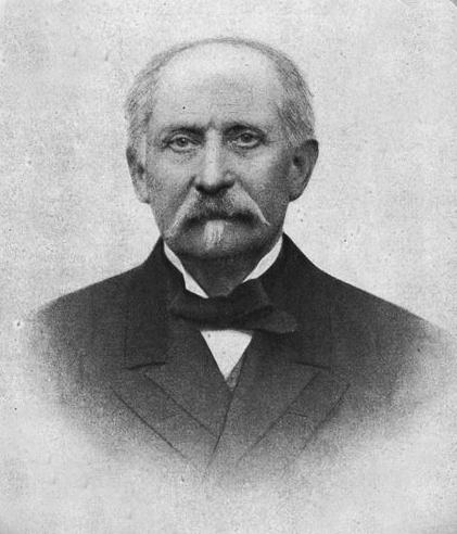 Henrik Kellgren (1837-1916)